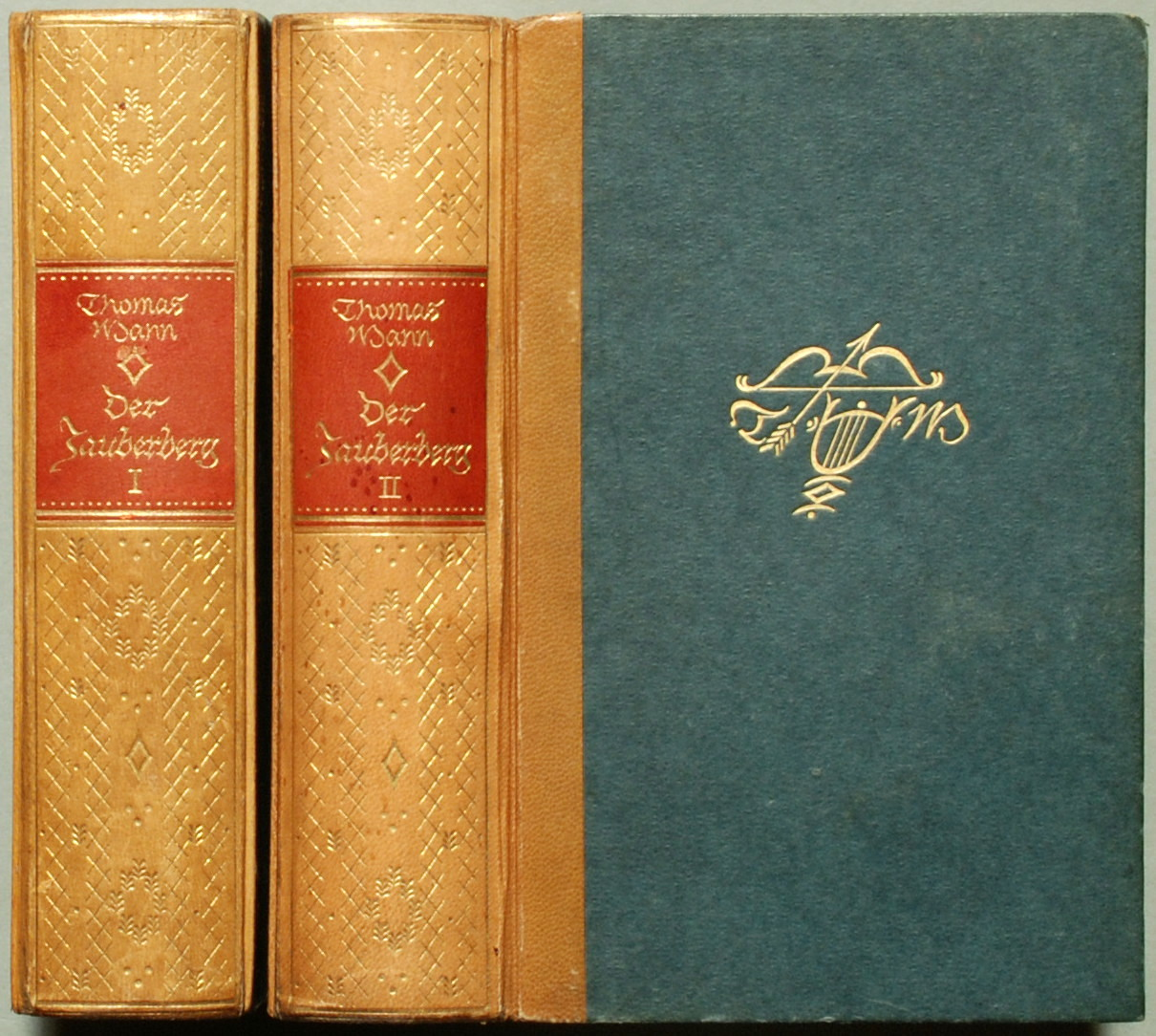 Thomas Mann: Der Zauberberg. Roman. Berlin: S. Fischer 1924, 2 Bde. 578 u. 629 Seiten. Erstausgabe (Potempa D 3.1, Bürgin I 23, Wilpert/Gühring² 28), Orig.- Halbleder 18,8,x 12 cm.